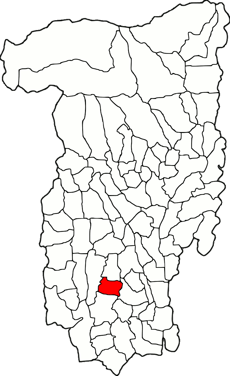 Lage der Gemeinde Măciuca im Kreis Vâlcea (RO).